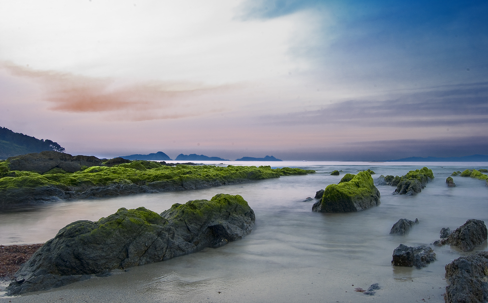 Illas Cíes, Vigo. Galiza.